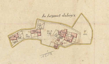 El Veïnat de Baix, de Bula d'Amunt, en el Cadastre napoleònic del 1812 (Arxius Departamentals dels Pirineus Orientals)